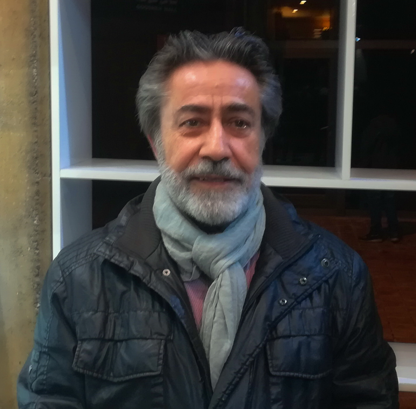 اسماعیل واثقی، فرهنگسرای نیاوران پاییز ۱۳۹۷